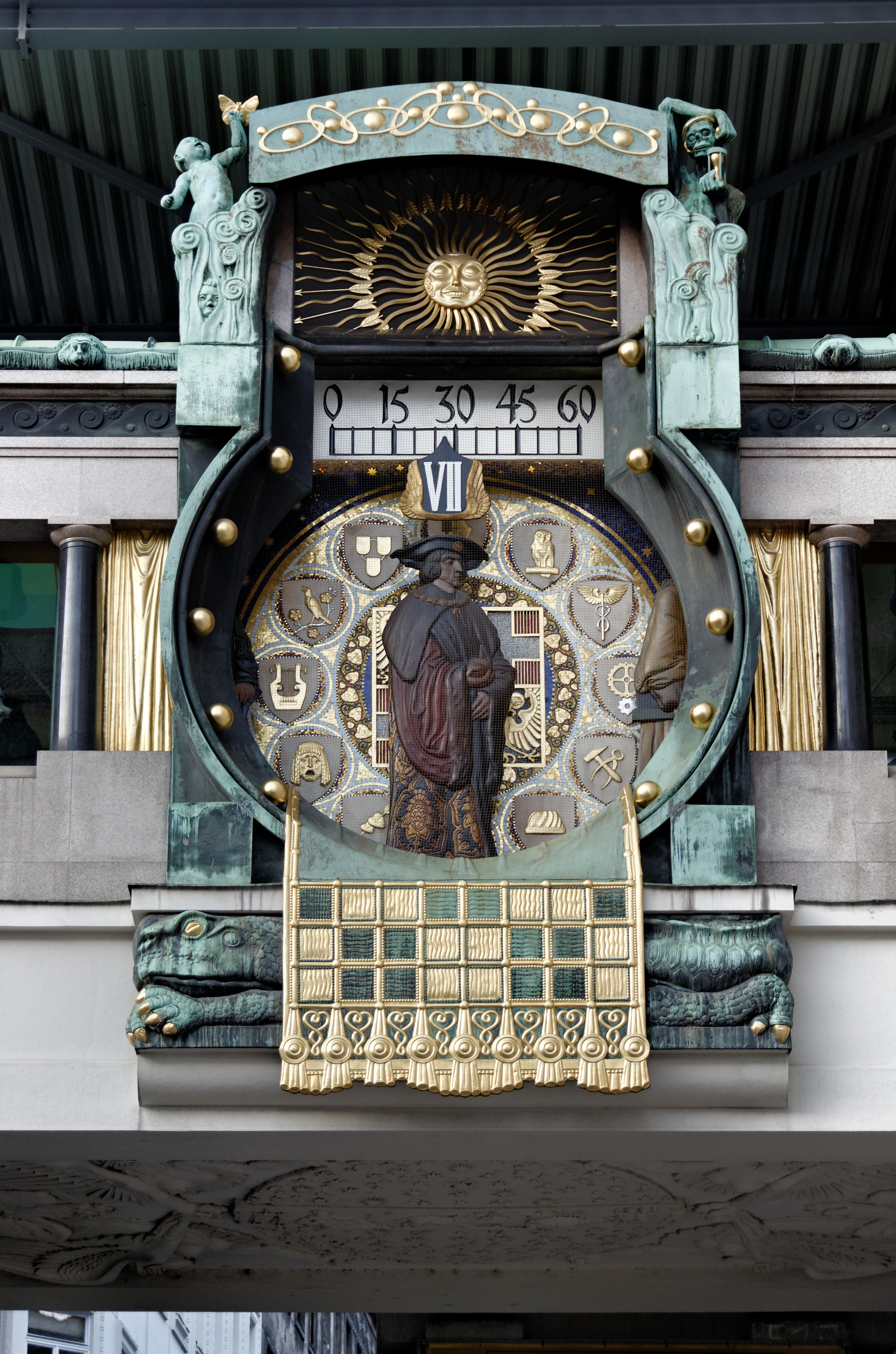 Ankeruhr, Vienne